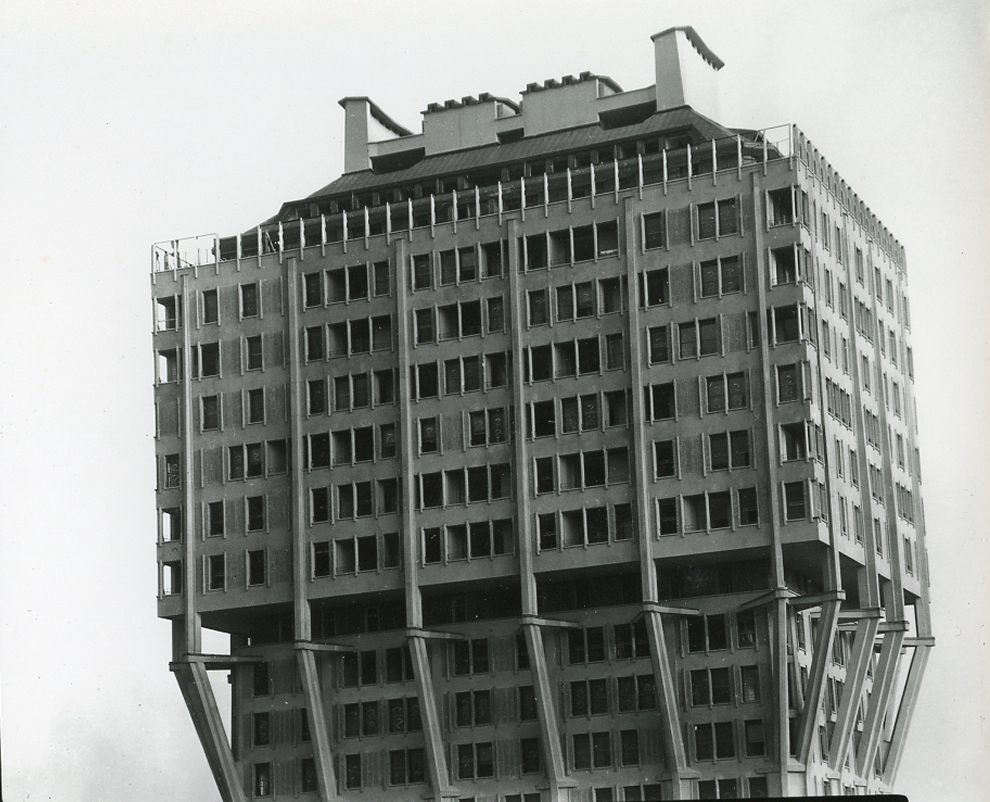 Servizio fotografico : Milano, 1960 / Paolo Monti. - Fototipi: 2 : Positivo b/n, gelatina bromuro d'argento/ carta, provino a contatto da pellicola 10x12. - ((La suddetta serie è contenuta nella scatola identificata con la numerazione 142; sul coperchio iscrizione manoscritta a pennarello: "Contatti 7a"